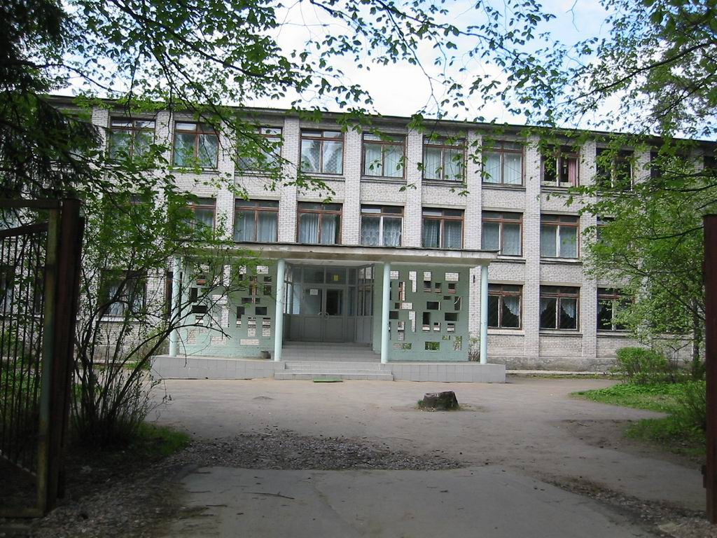 Всеволожская школа № 5